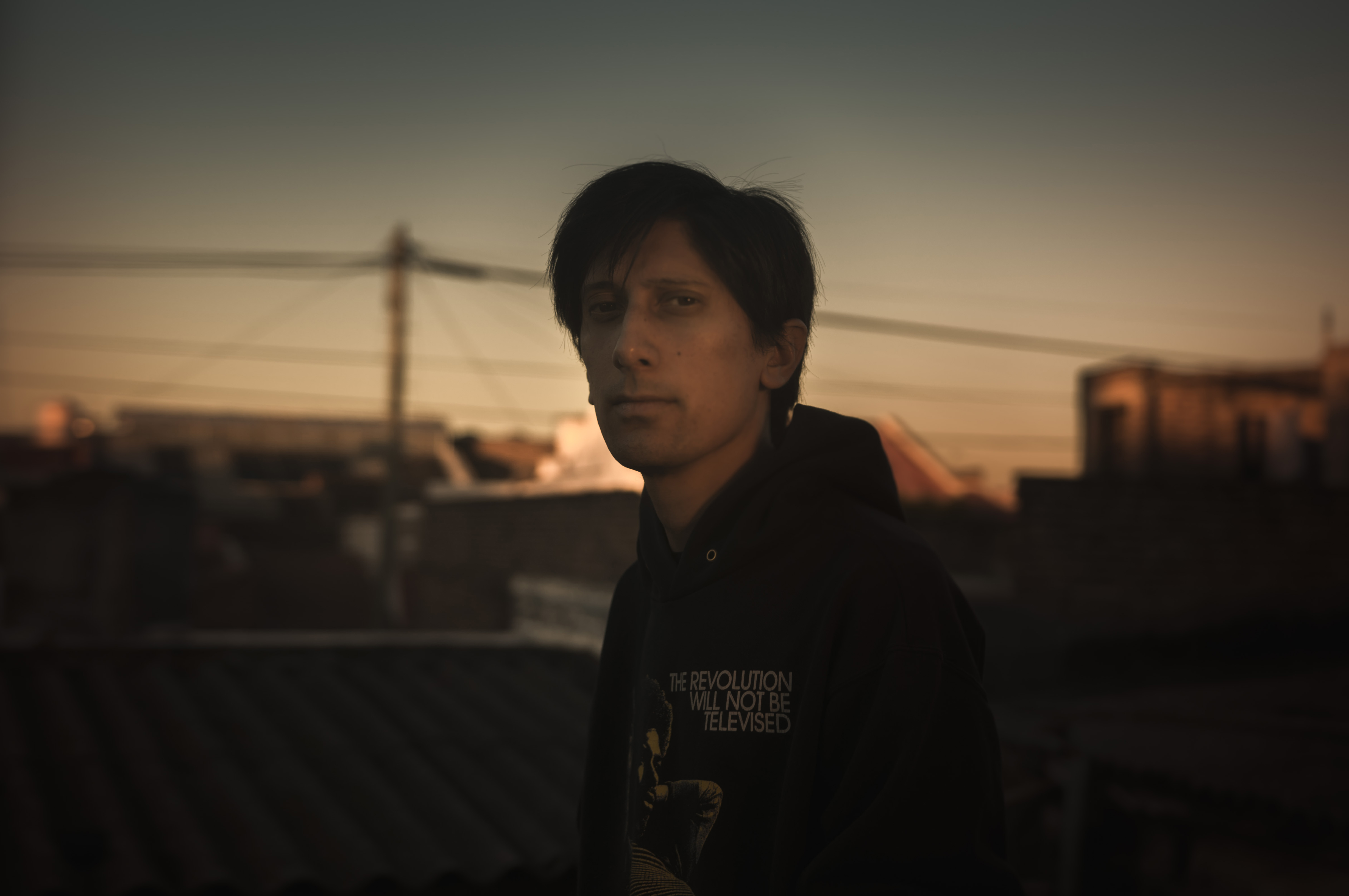 Foto x Rocío Frigerio